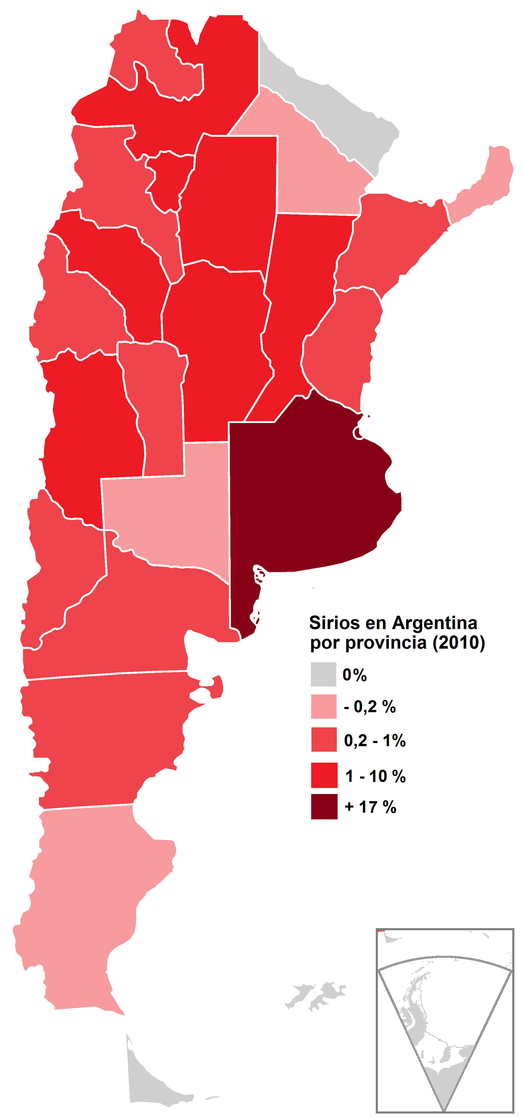 República Argentina por provincia. Población nacida en Siria, en porcentaje. Año 2010. Fuente: Censo 2010 - INDEC.